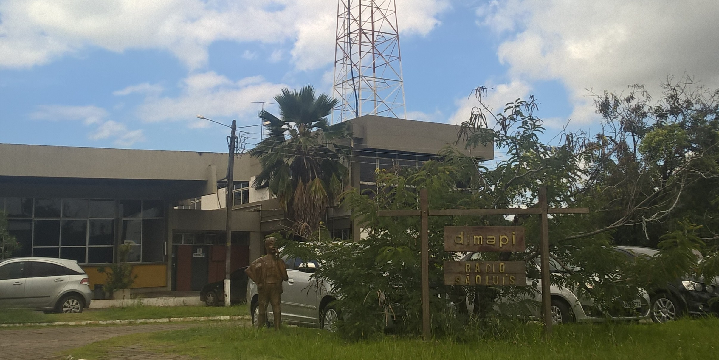 Fachada da sede das rádios Jovem Pan FM São Luís e Jovem Pan News São Luís e da distribuidora DIMAPI, em São Luís, MA - Brasil